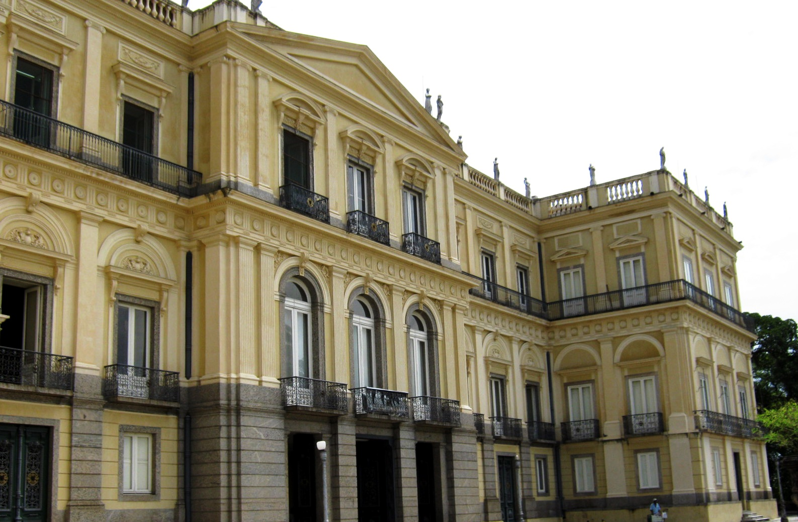 Foto do Museu Nacional da UFRJ, no Paço de São Cristóvão, Rio de Janeiro, Brasil.